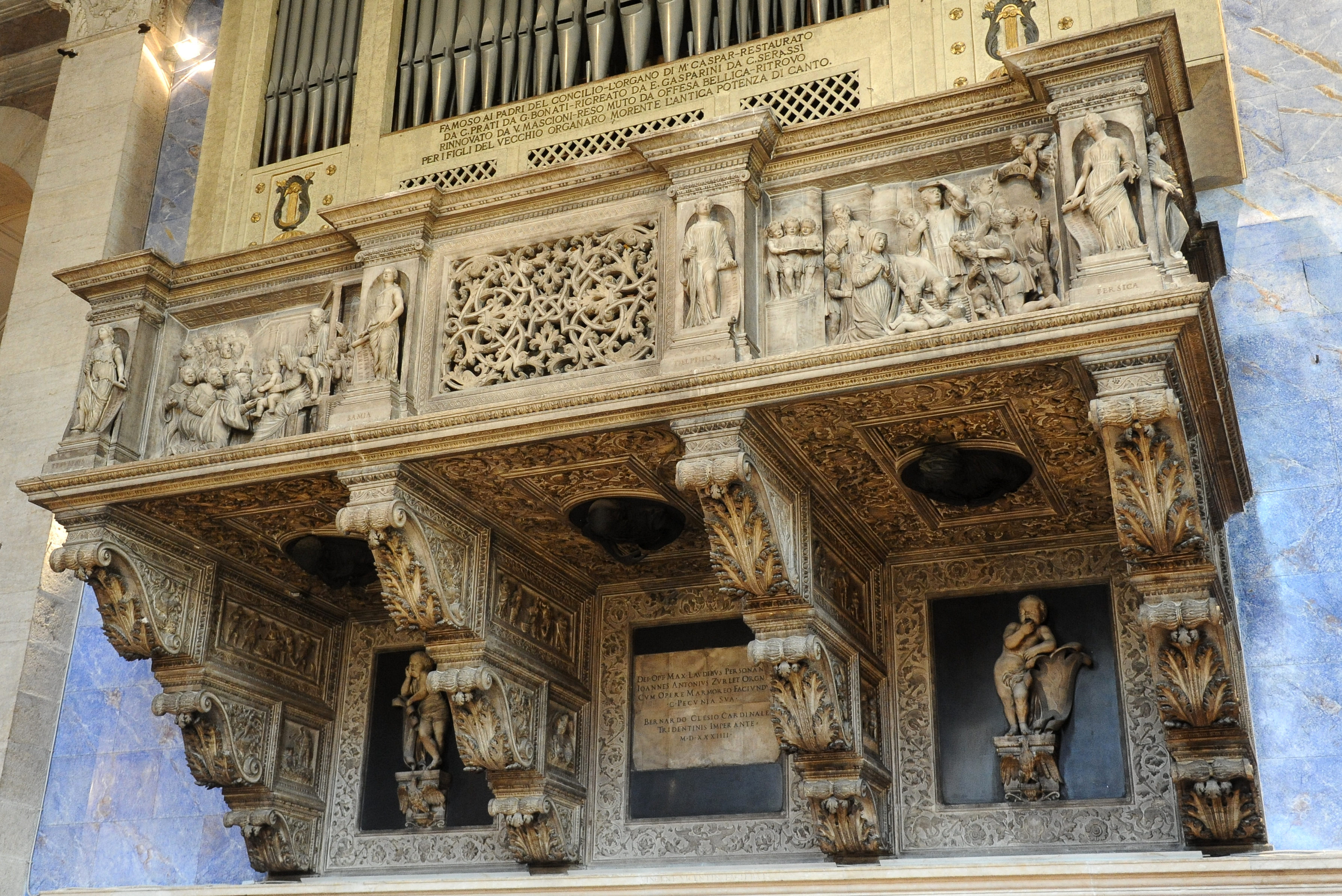 Cantoria della Chiesa di Santa Maria Maggiore a Trento, di Vincenzo e Gian Girolamo Grandi.